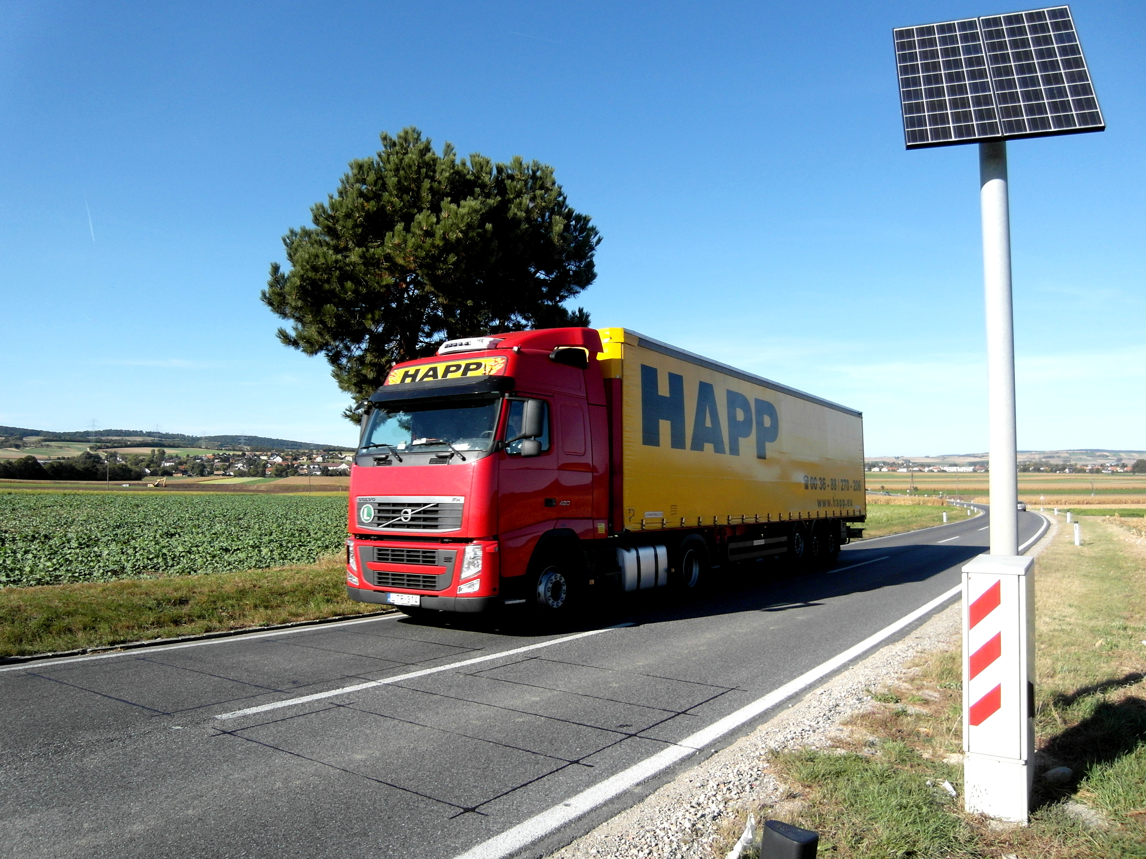 Automatische Dauerzählstelle Laaer Straße km 3,65